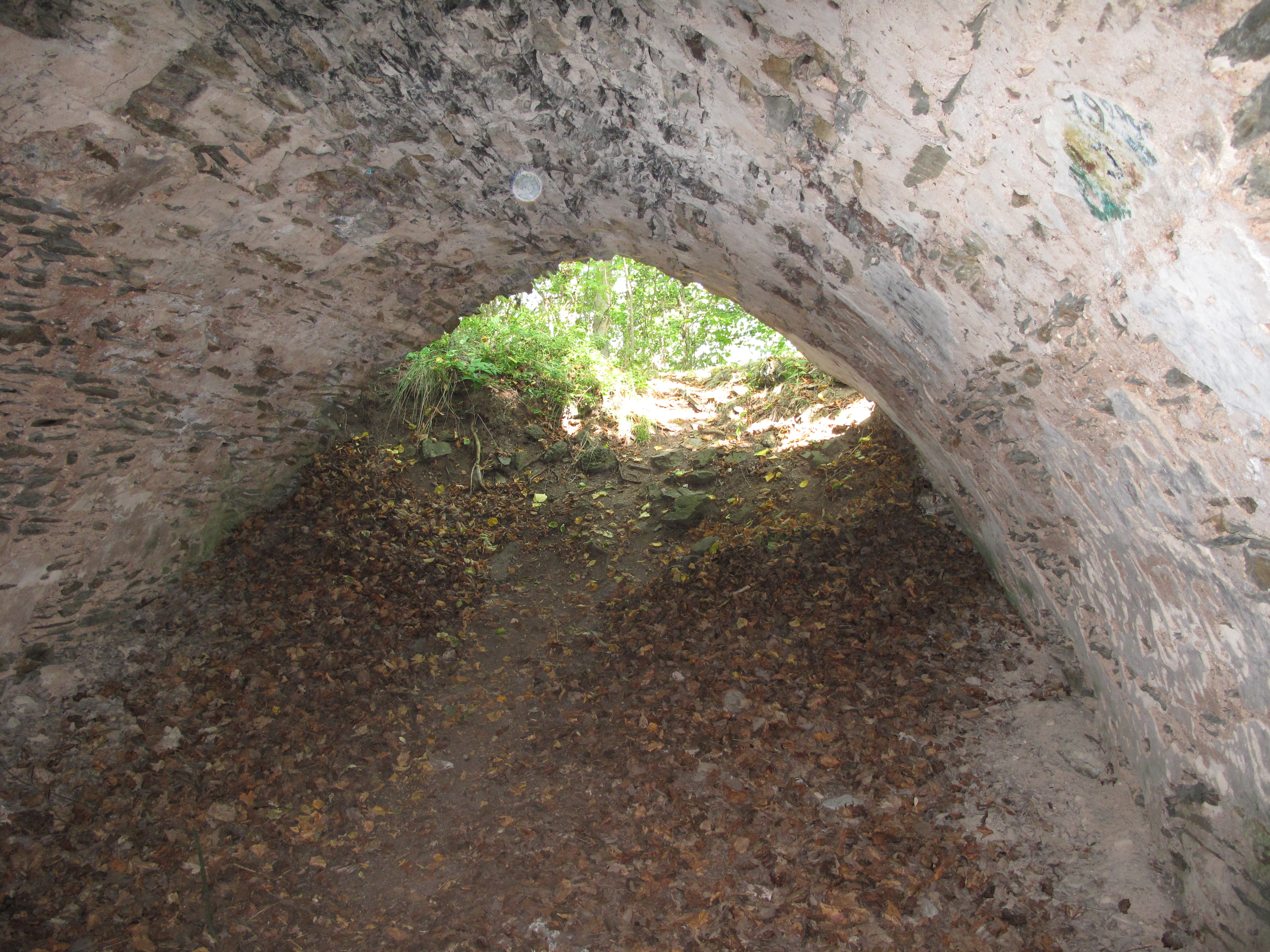 Zřícenina hradu Preitenstein (Nečtiny). Okres Plzeň-sever, Česká republika.